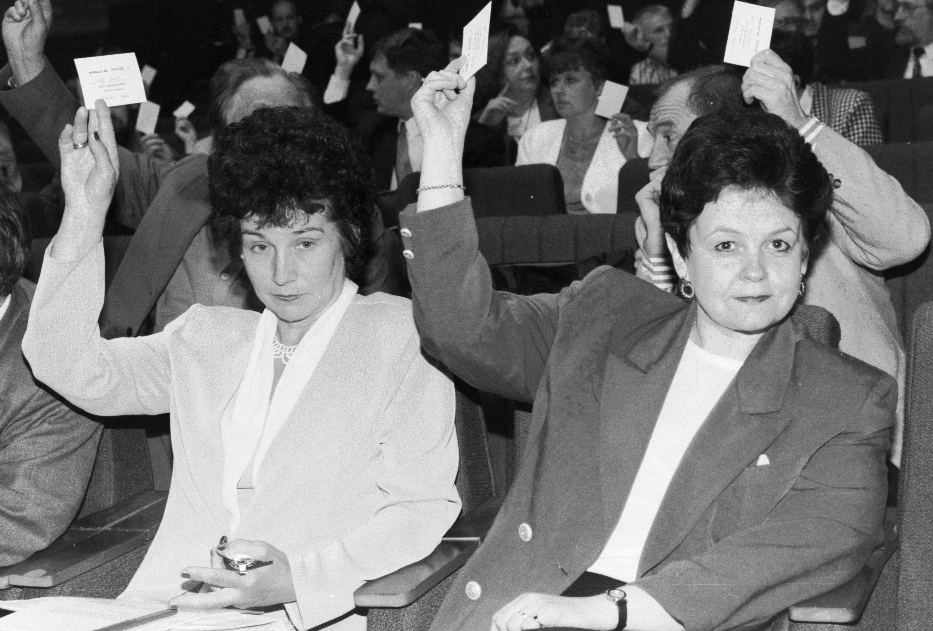 Tiina Mitt ja Andra Veidemann hääletamas Arengupartei asutamiskongressil.